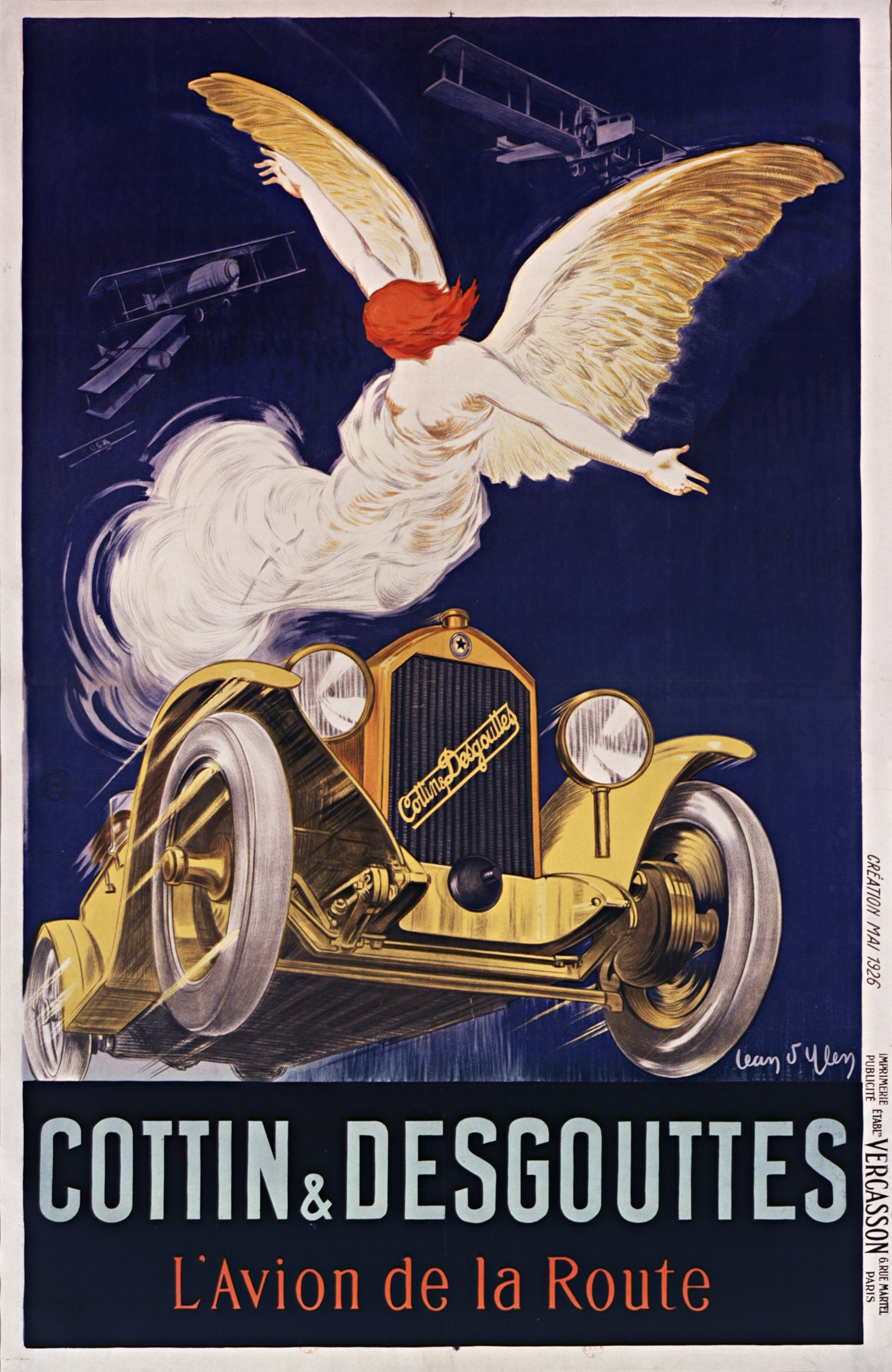 Cottin et Desgouttes l'avion de la route.